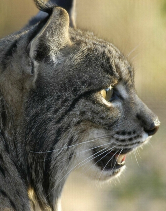 Lynx profile